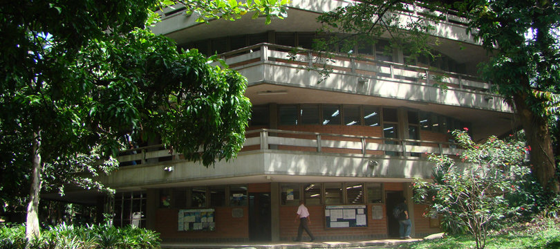 Bloque 11 - Escuela de Idiomas